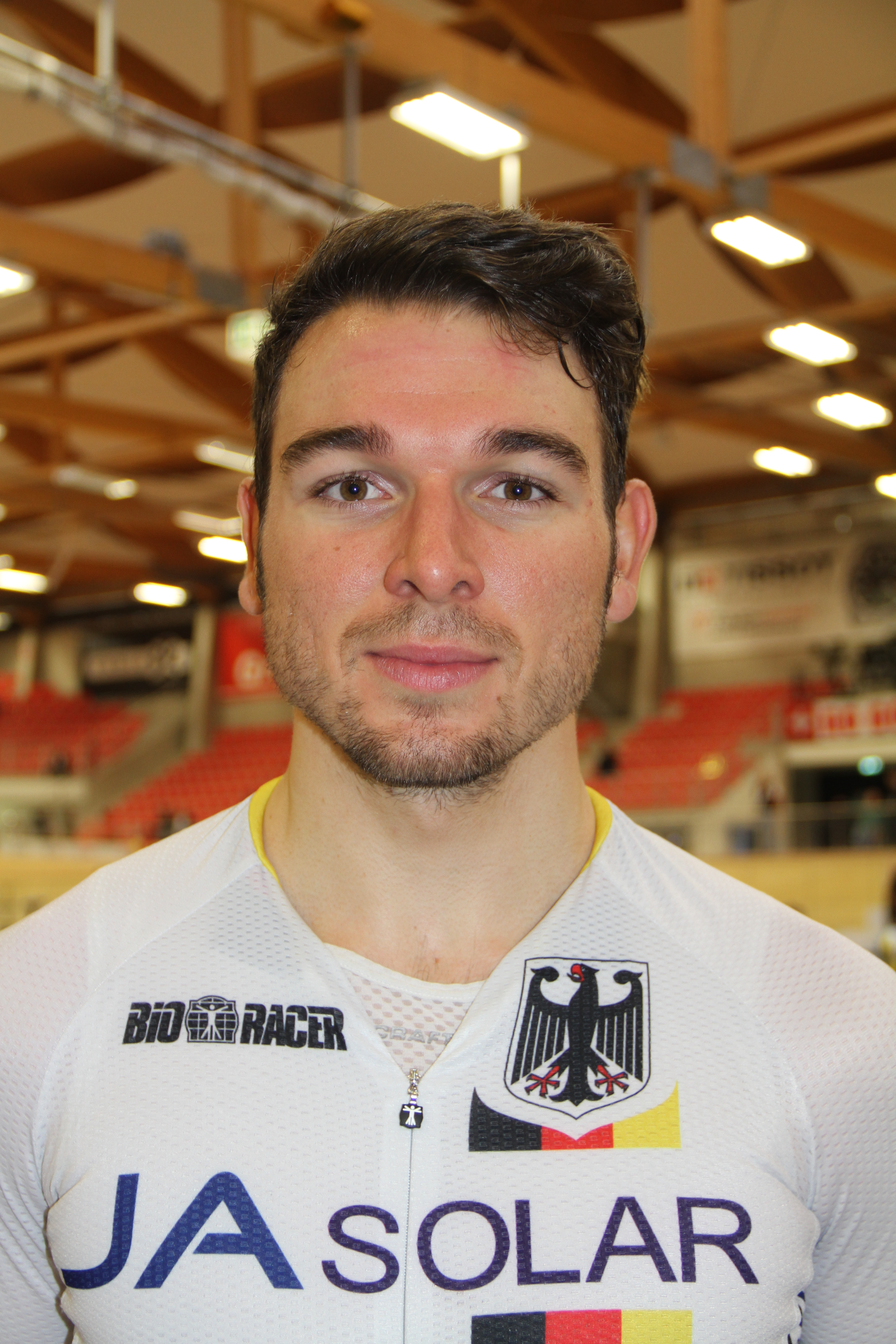 Kersten Thiele, deutscher Radsportler The making of this document was supported by the Community-Budget of Wikimedia Germany.